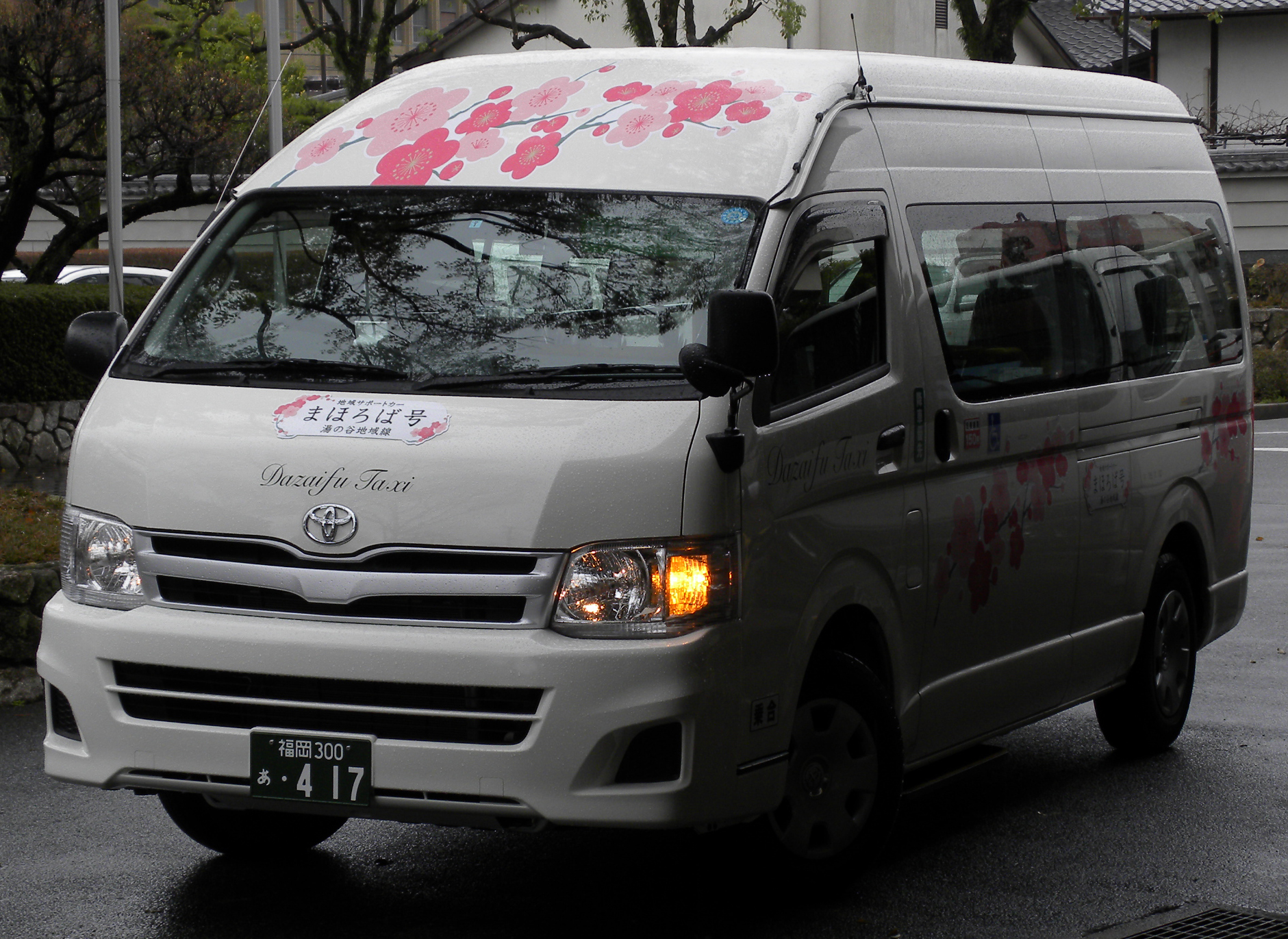 太宰府タクシー（福岡県） 太宰府市「地域サポートカーまほろば号湯の谷地域線」の車両